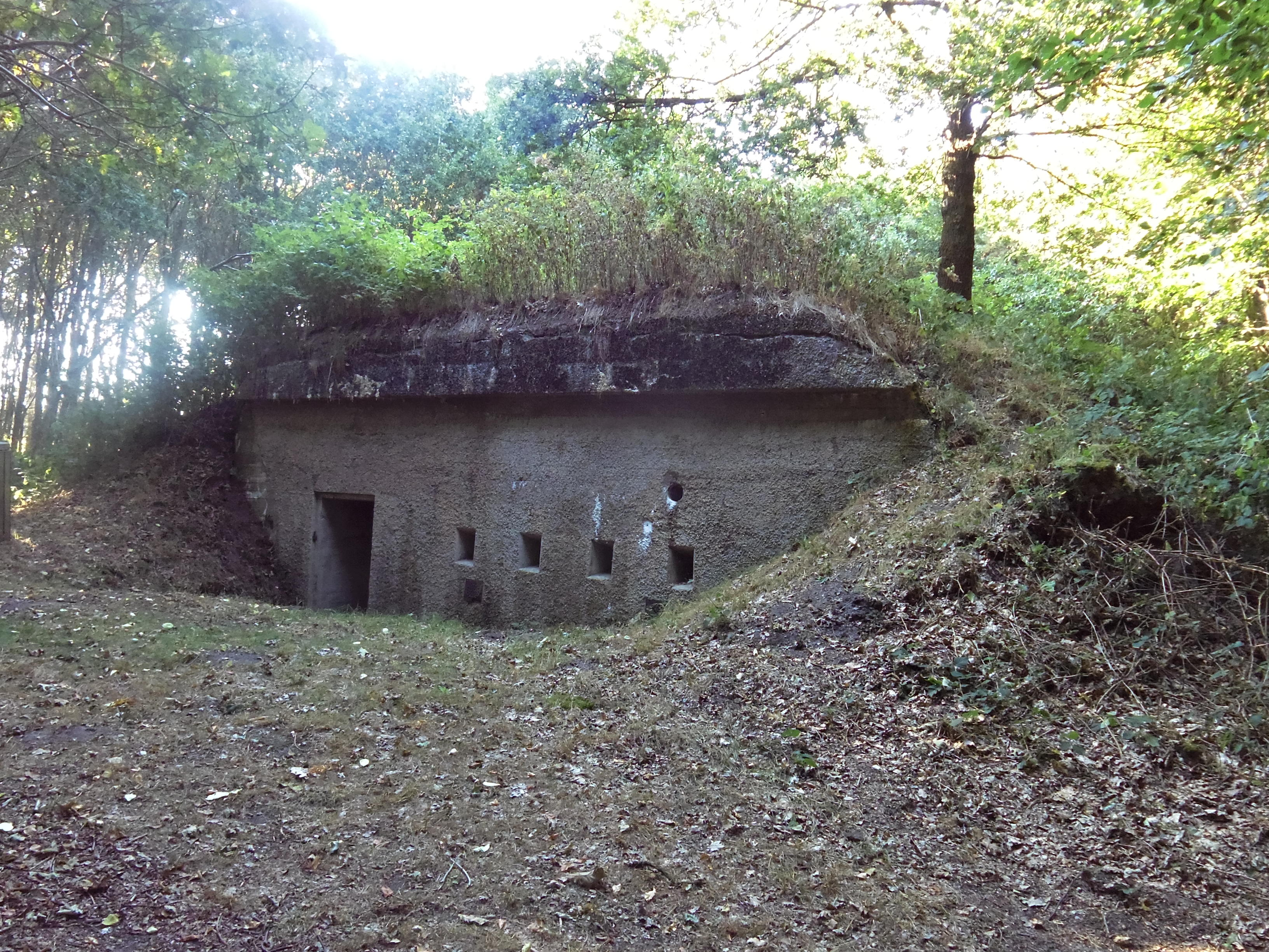 Andholm Batteri - vestlige mandskabsbunker